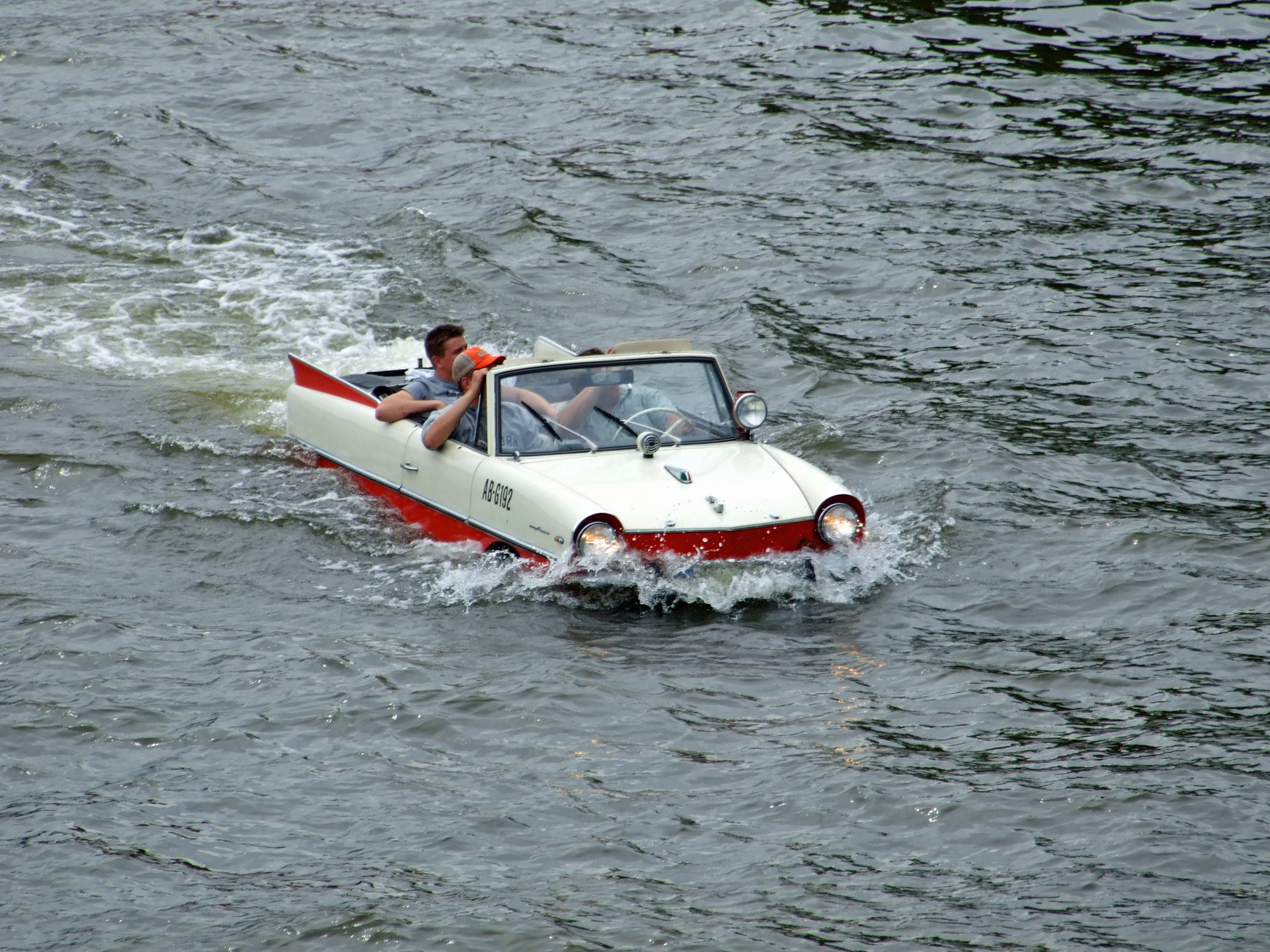 Amphicar im Main, am Eisernen Steg in Ffm